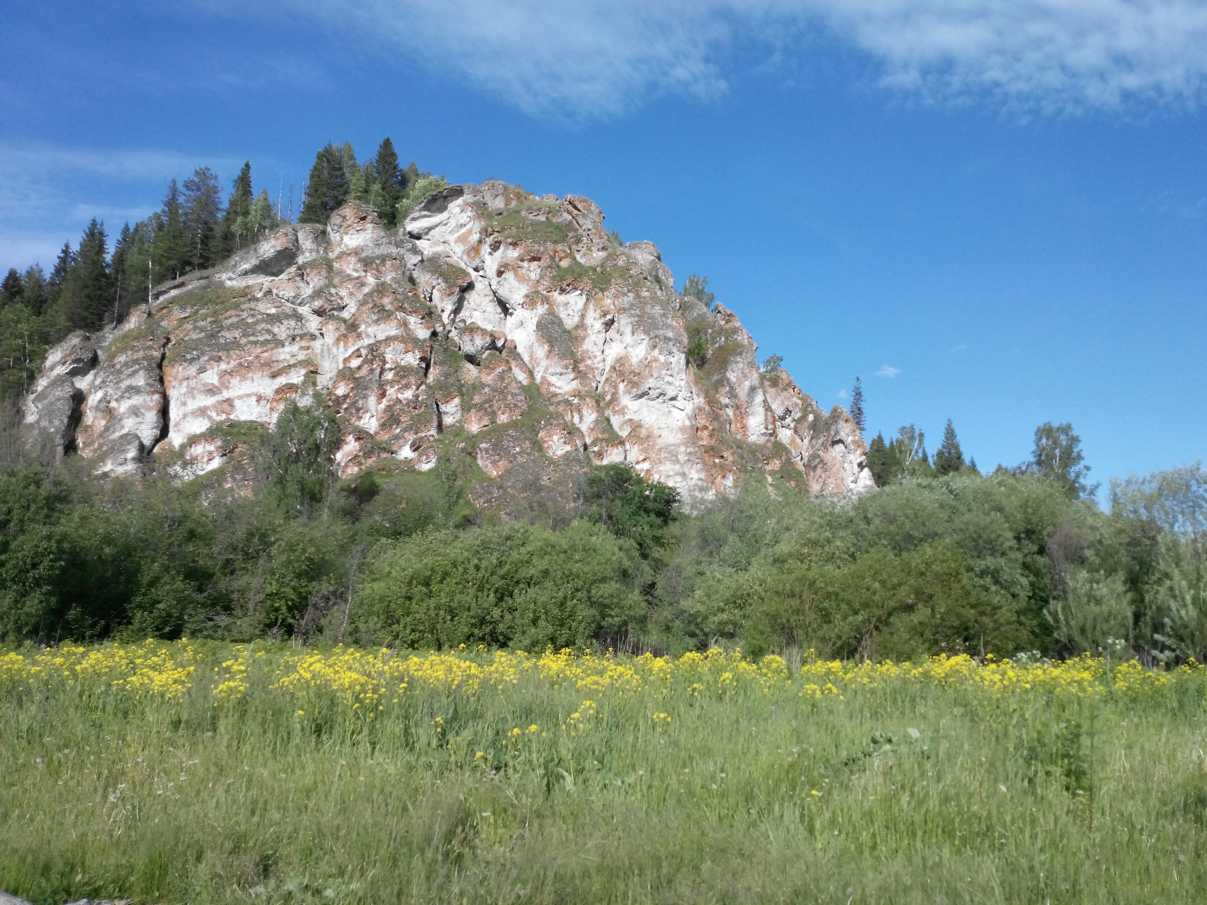 Аликаев Камень (Марьин Утес) с окружающими лесами: Красноуфимский район, Свердловская область This image is related to the protected area of Russia number 6610355